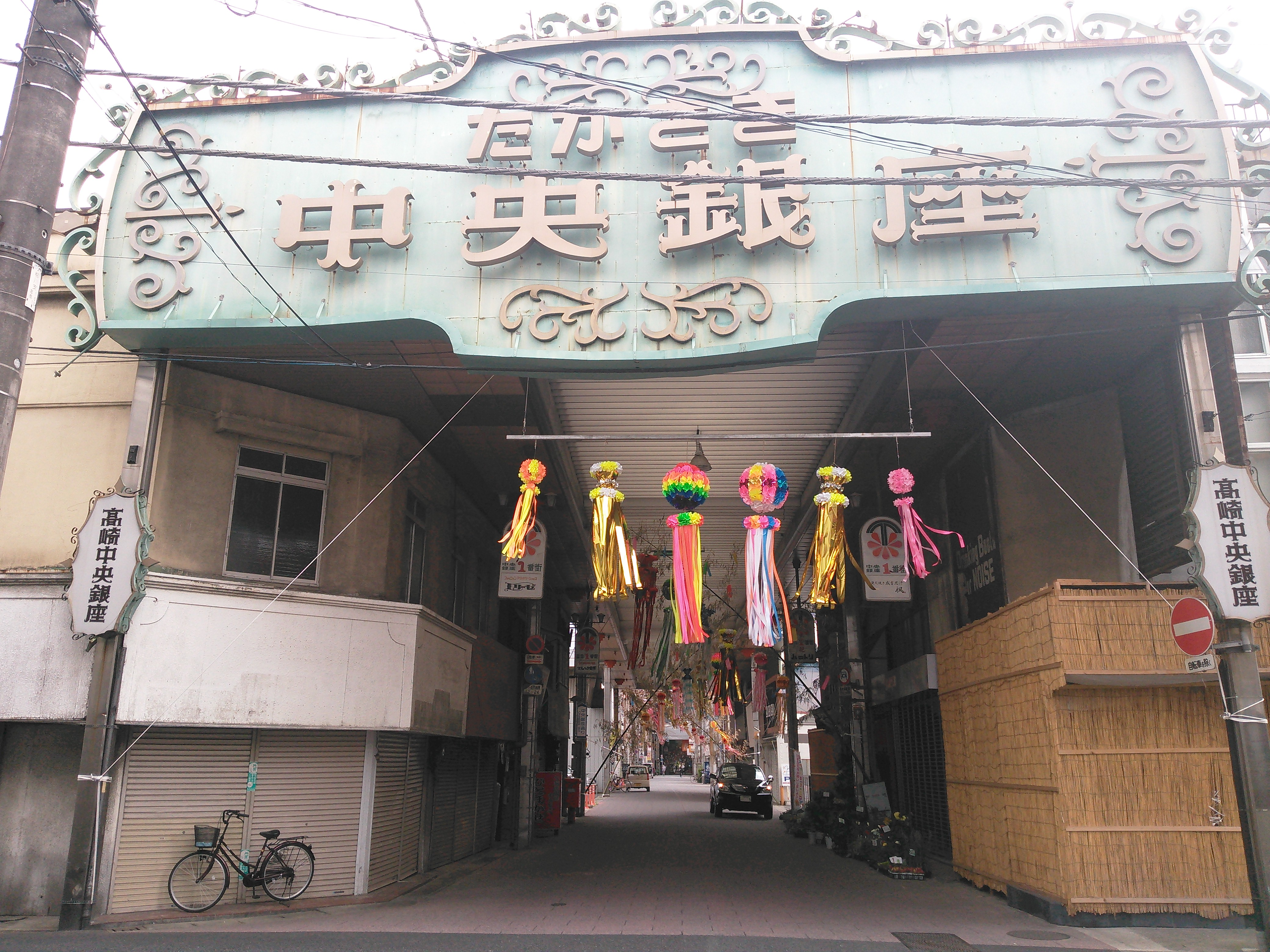 群馬県高崎市、高崎中央銀座商店街北側エントランス